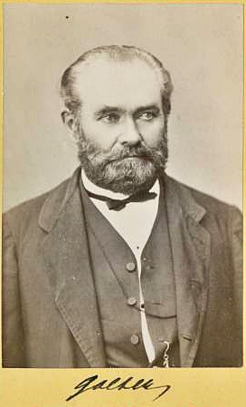 Carl Ludwig Golsen (1807-1872), Reichstagsabgeordneter aus Zell, Rheinpfalz